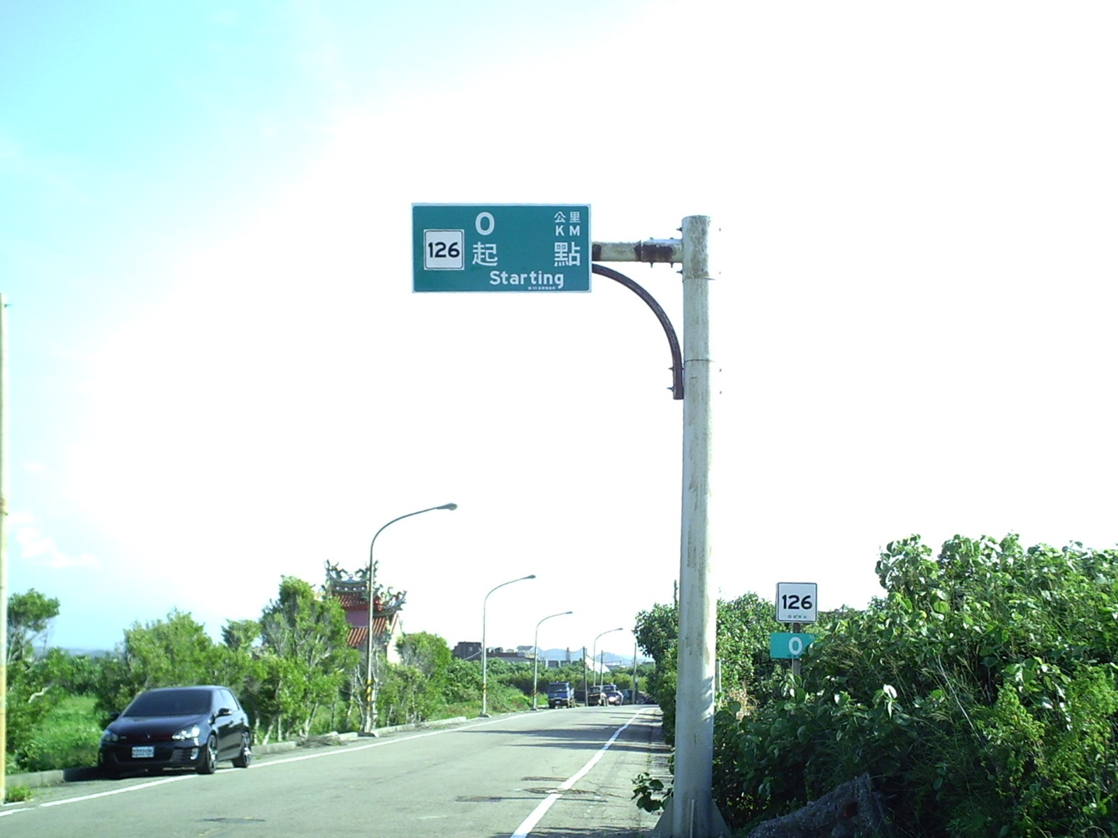 臺灣縣道126號起點，位於苗栗縣後龍鎮。